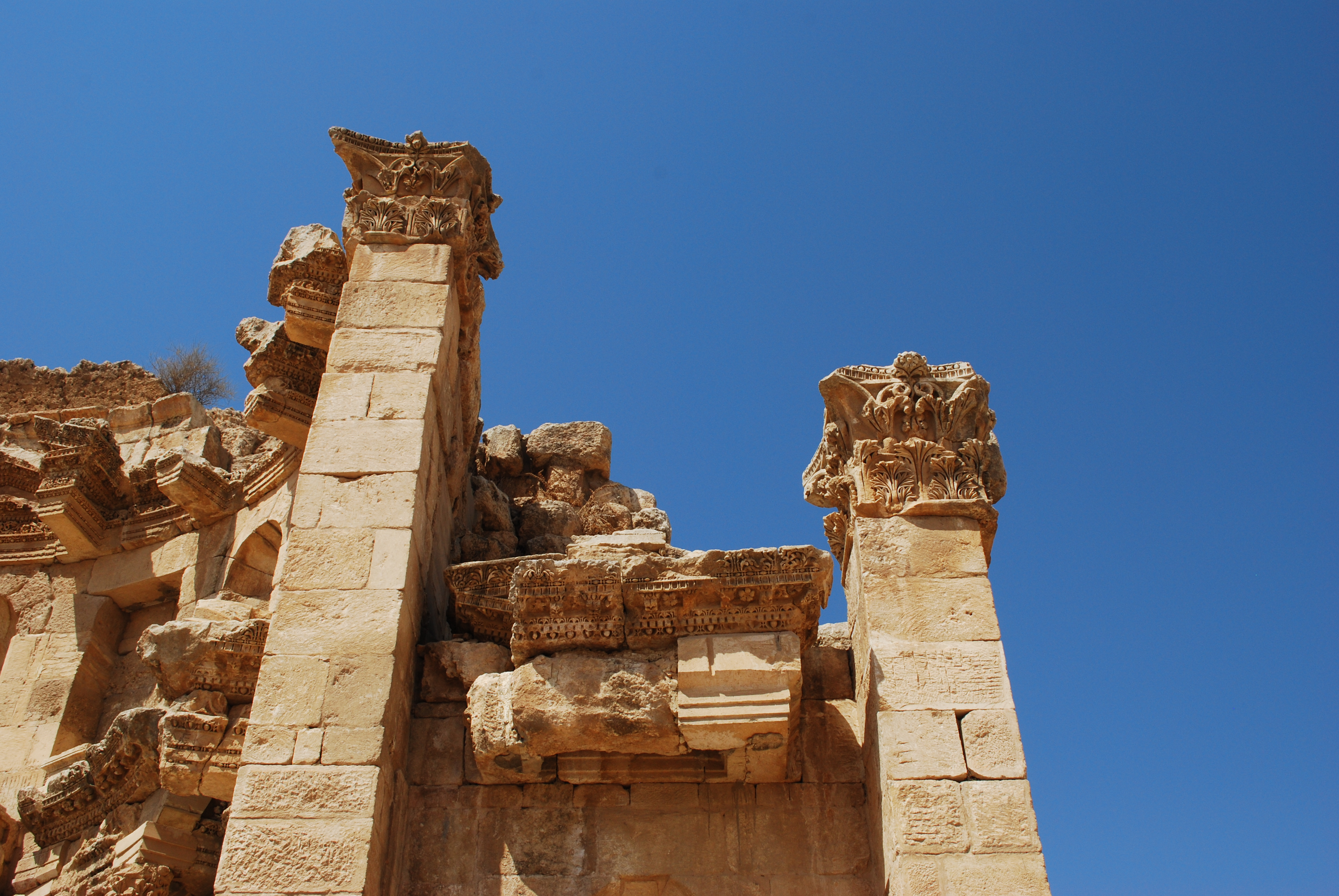 Le nymphée de Gerasa.